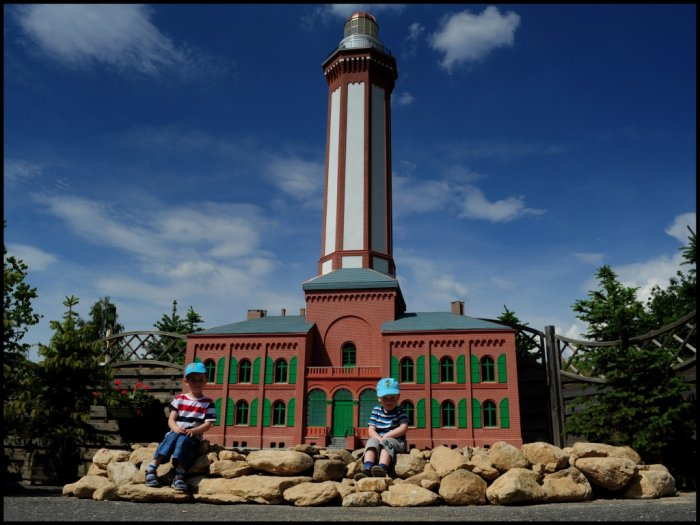 Zdjęcie wykonane jeszcze w Parku Miniatur Zabytków Dolnego Śląska w Kowarach